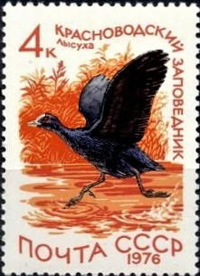 Почтовая марка СССР. 1976. Заповедники СССР. Красноводский заповедник. Лысуха. Номер в каталоге ЦФА 4613